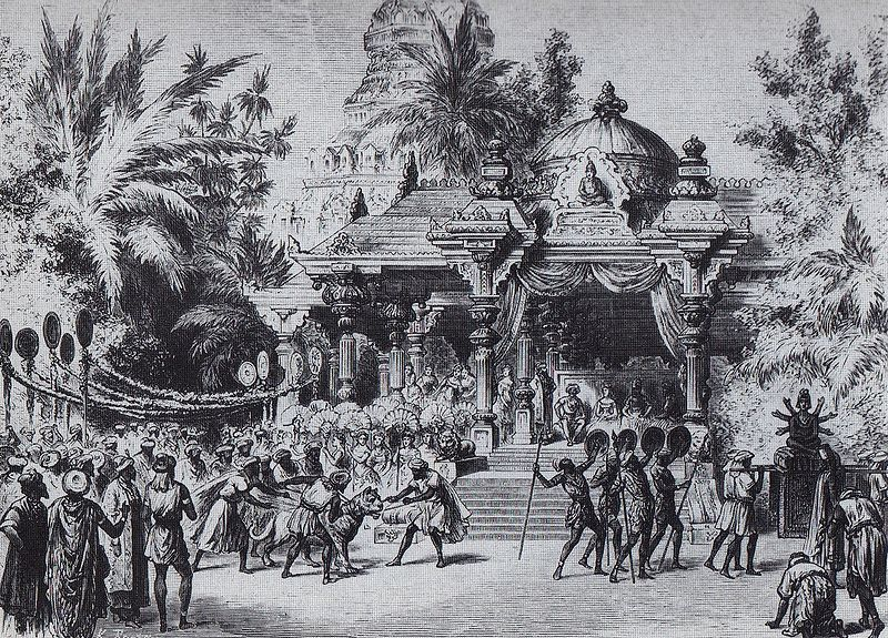 Lithographie de 1877. Auteur inconnu